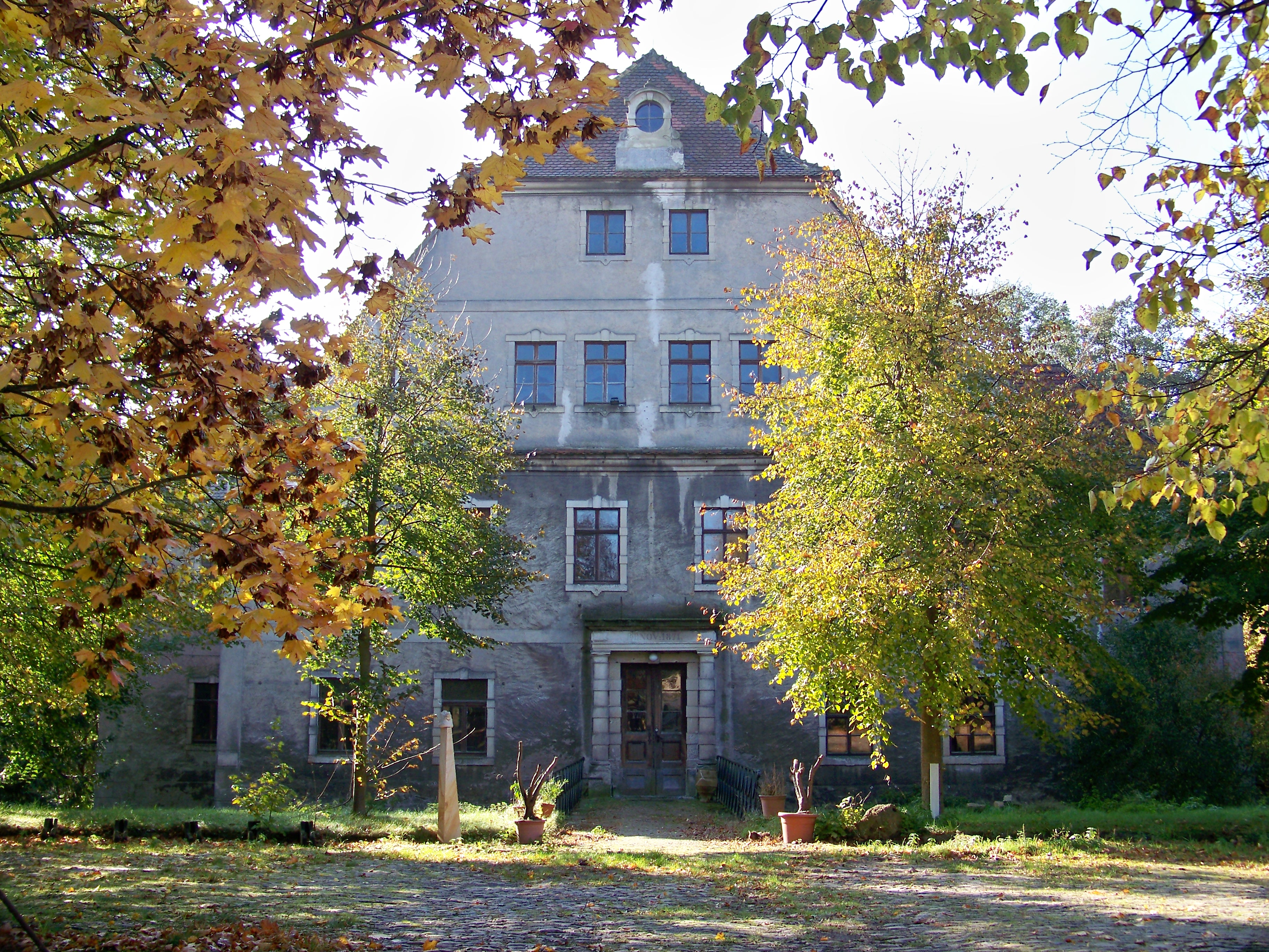 Schloss in Falkenhain/Sachsen